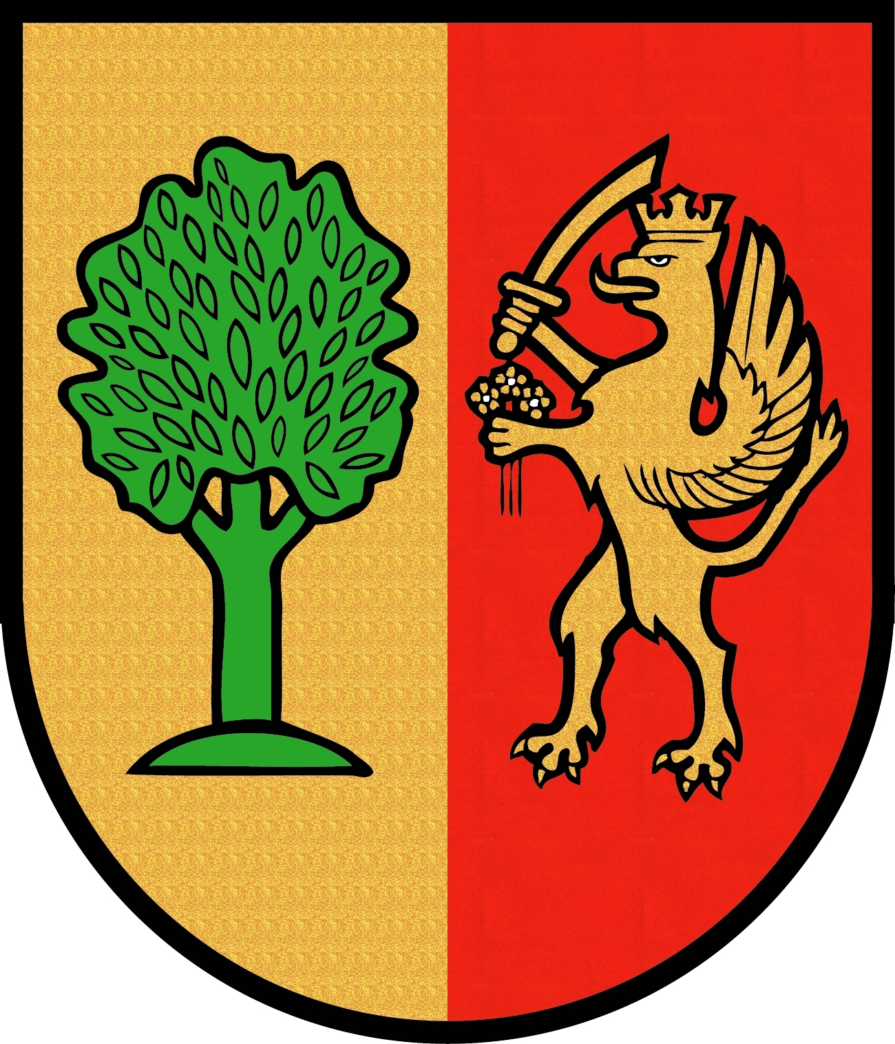 In einem von Gold und Rot gespaltenen Schild, vorne ein grüner mit Blättern besäter Laubbaum, hinten ein nach rechts gewendeter gekrönter goldener Greif, in der erhobenen Linken ein Krummsäbel, in der vorgestreckten Rechten drei goldene bestängelte, weiß besamte Rosen haltend.